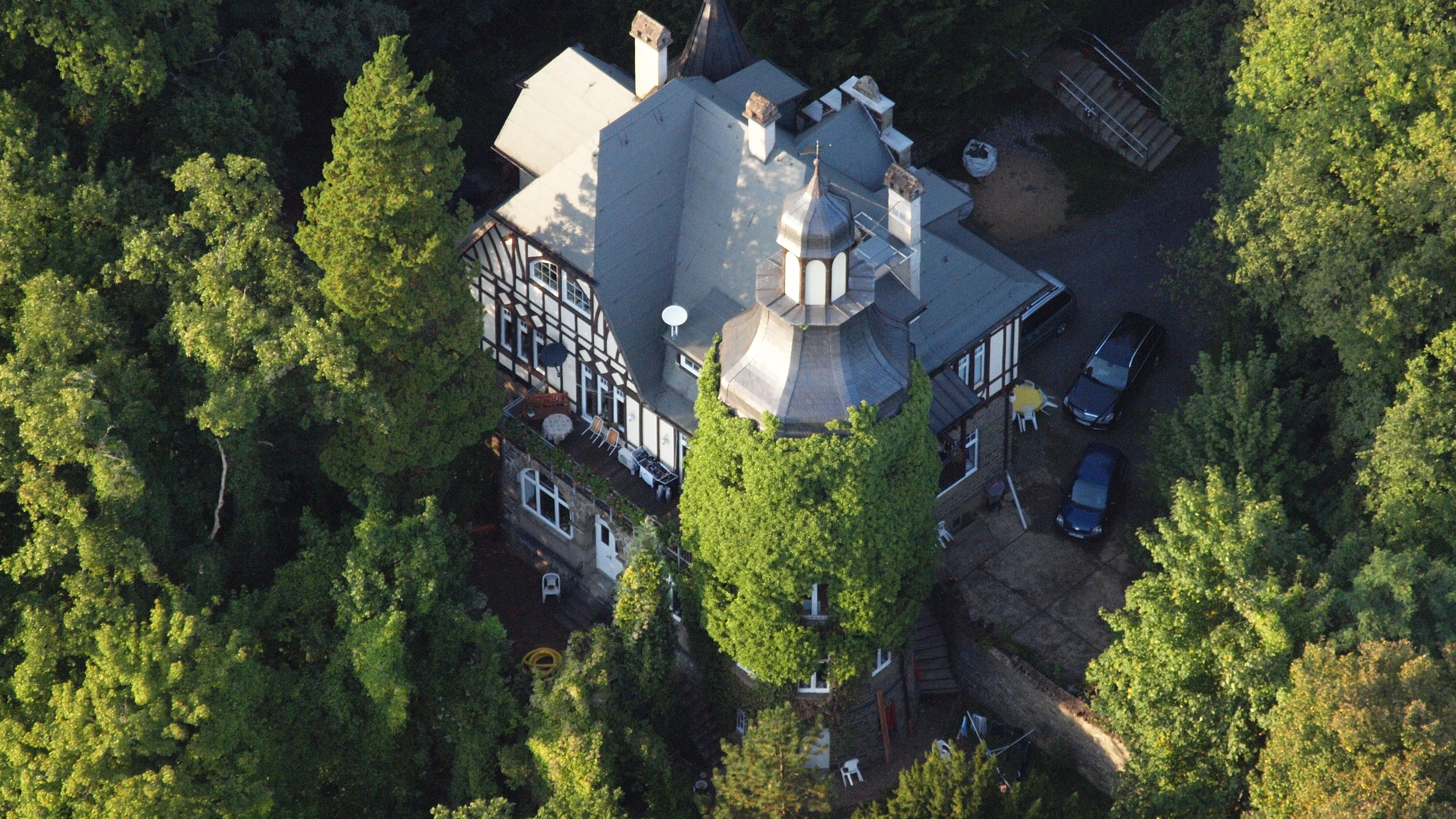 Burg Reifershardt, Windeck-Werfen: Luftaufnahme